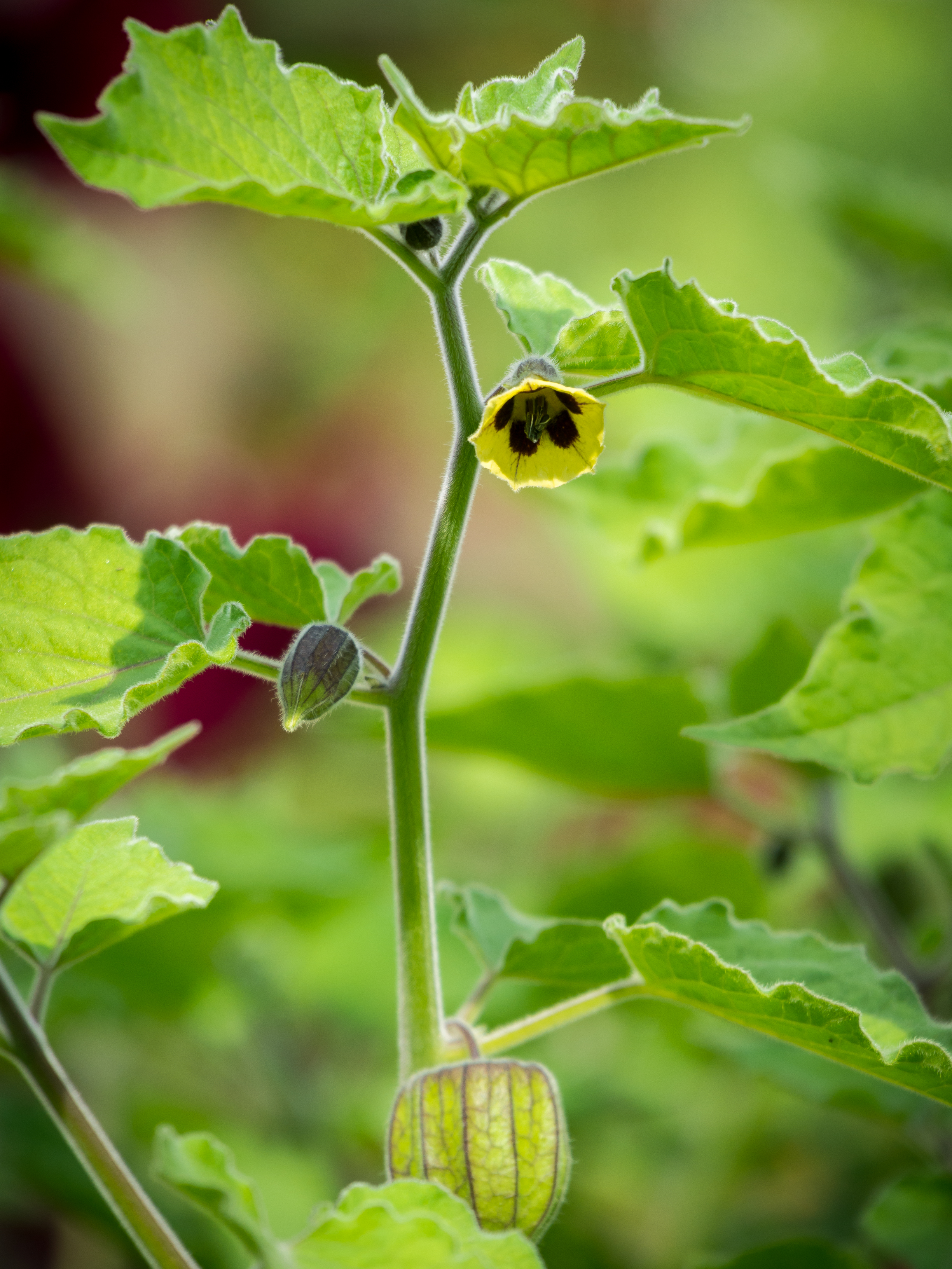 Physalis, Blasenkirschen, lat. Physalis peruviana, Pflanze mit einer Blüte, einem jungen Frucht und fast ausgereiftem Frucht